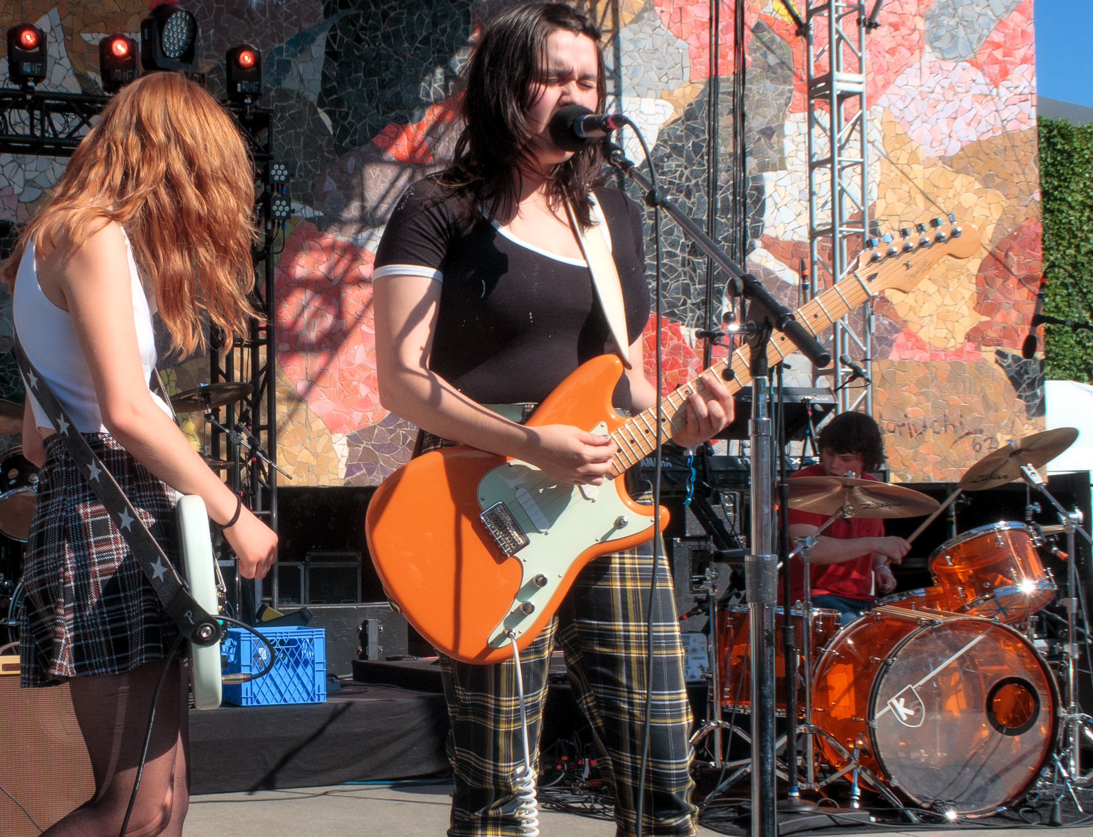 Skating Polly